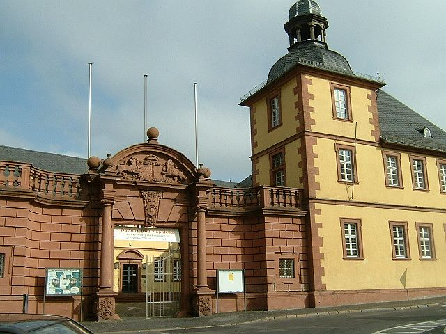 Schönborner Hof in Aschaffenburg, ein barockes Gebäude des 17. Jahrhunderts